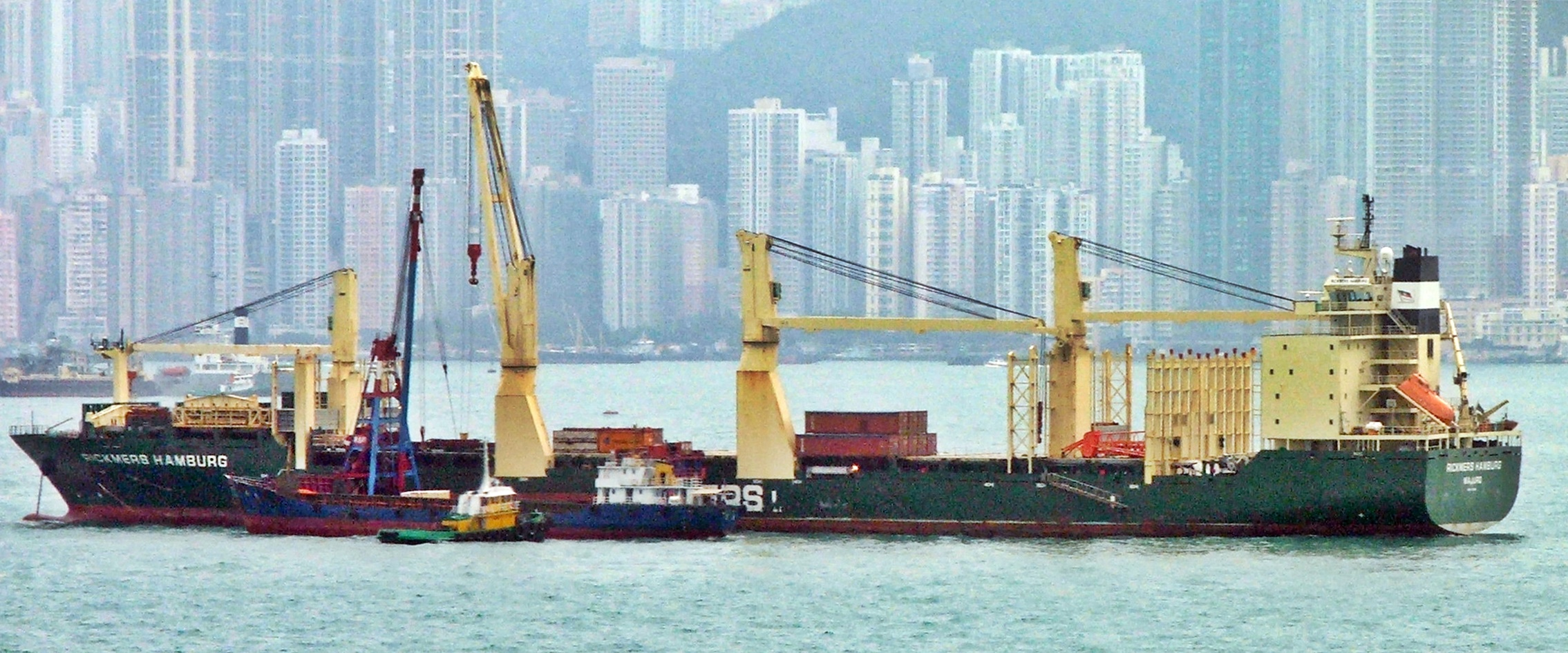 Die Rickmers Hamburg auf Hong Kong Reede